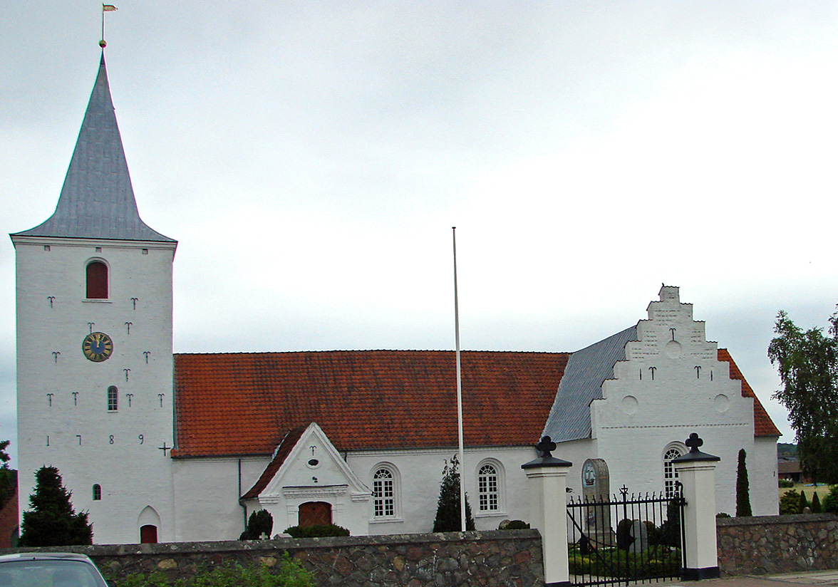 Kirken set udefra Østbirk Kirke ligger i Voer Herred i det tidligere Skanderborg Amt i Østjylland. Kirken hørte i middelalderen under Voer Kloster men præges nu af tilhørsforholdet til slægten Skram på Urup.